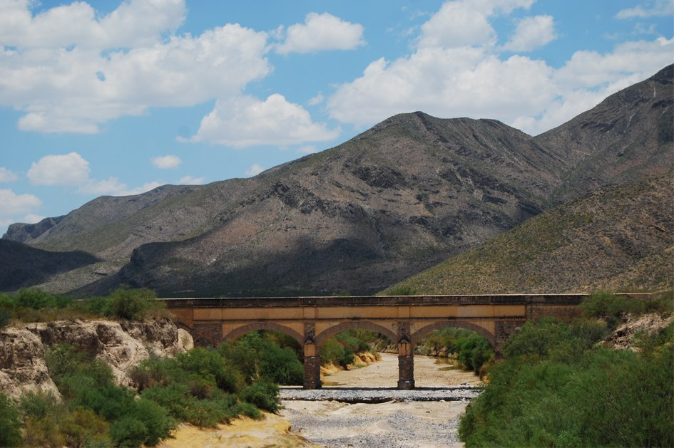 Coahuila Torreon Puente Jalisco